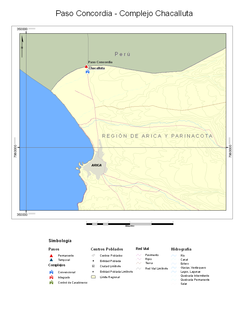 Complejo fronterizo Chacalluta, Arica, Chile.